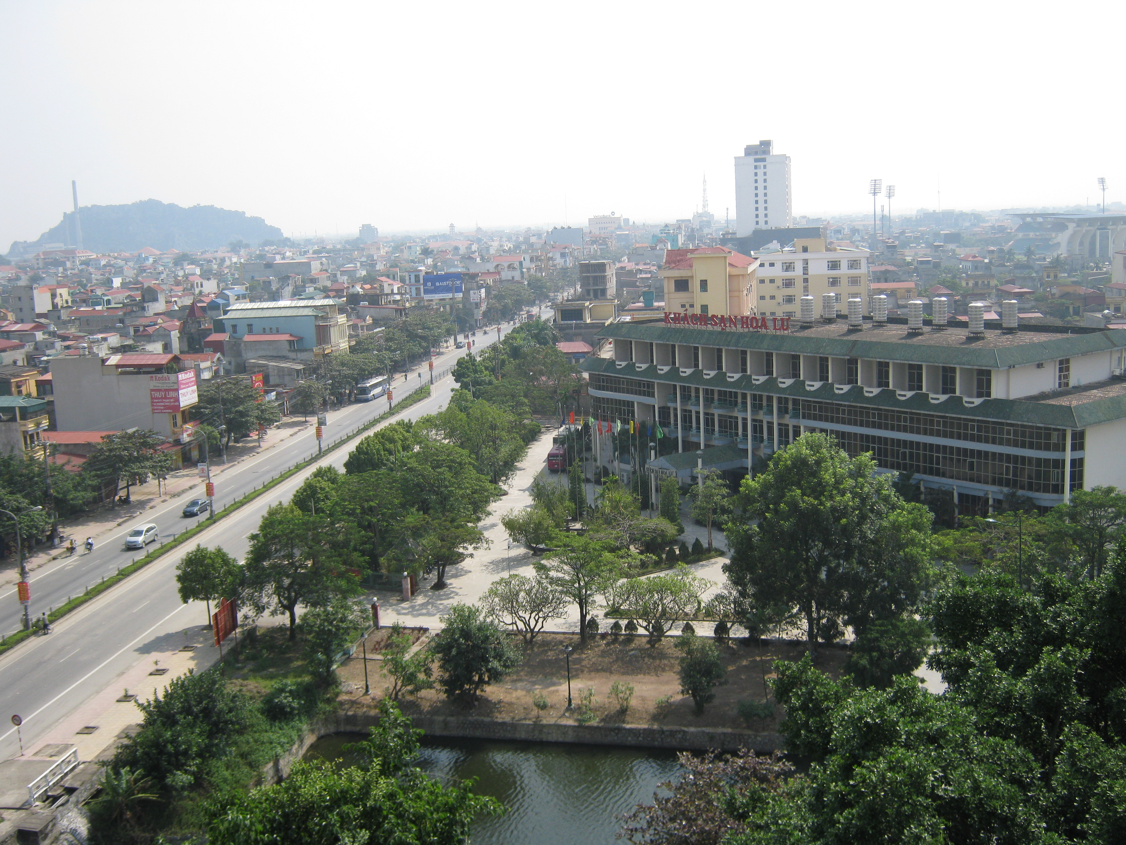 Nước Nam ta được chính thống kể từ đây